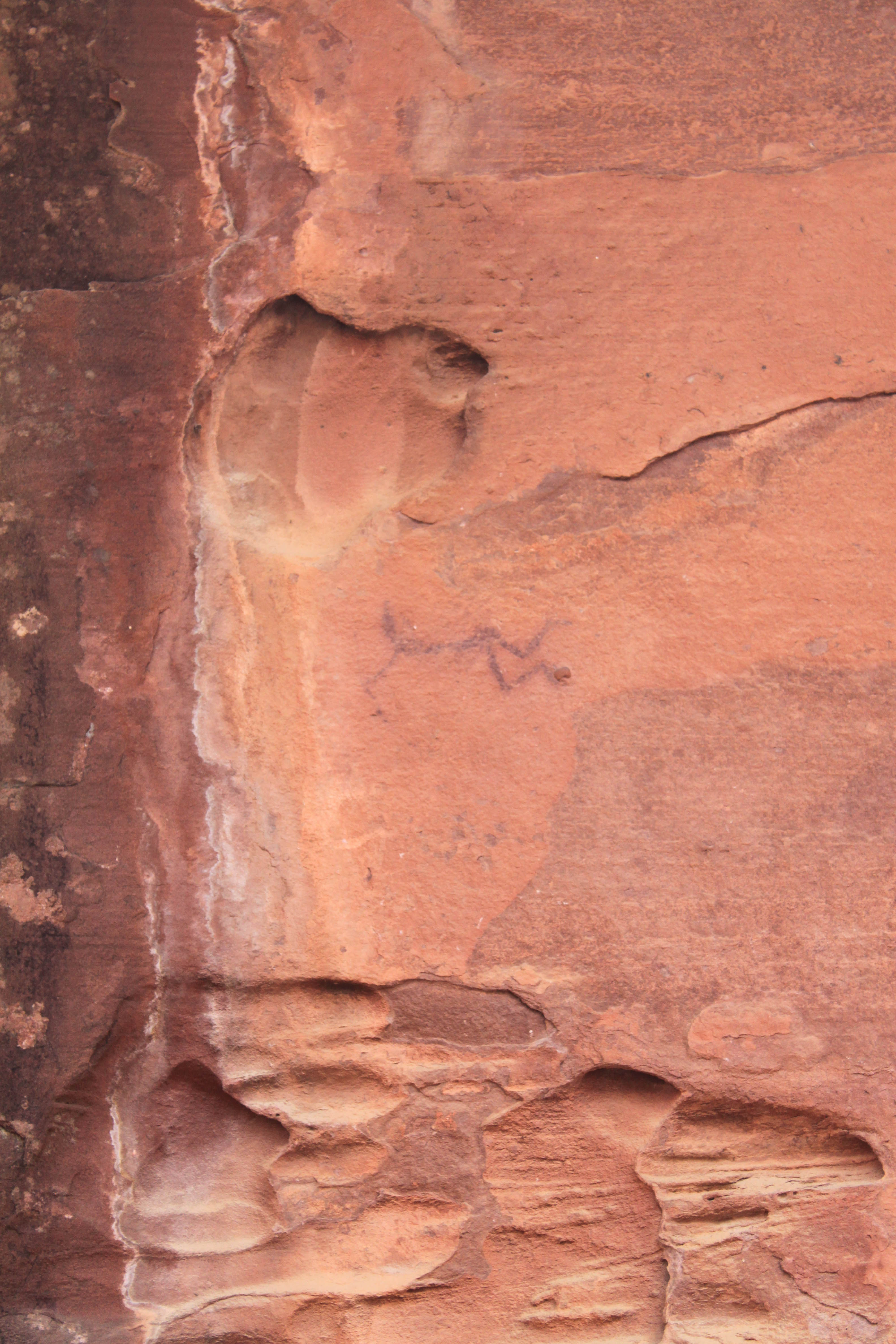 Abrigo del Arquero de los callejones cerrados situado en la Sierra del Rodeno en el término municipal de Albarracín, Teruel, España.